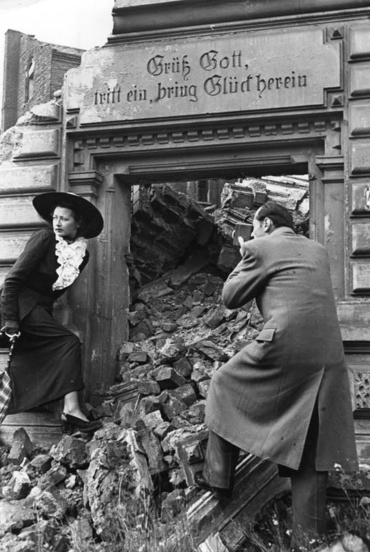 Lore Lorentz, Filmaufnahmen Illus/dpd "Komödchen" filmt.... Das bekannte Düsseldorfer Kabarett "Komödchen" begann mit den Aussenaufnahmen zu dem ersten westdeutschen Kabarettfilm "Das Fäustchen" (auch aus Anlass des Goethe-Jahres) nach einer Idee von Kay und Lore Lorentz, den Gründern des Kabaretts. In diesem Film wird versucht, zum ersten Mal eine Verbindung zwischen Film und Kabarett zu finden. Die Handlung wird hier von der Leinwand auf die Bühne und umgekehrt übergehen. Unser Bild zeigt eine Szene mit Lore Lorentz während der Aufnahmen mit einem Schmalfilm-Gerät. 27.9.1948 [Herausgabedatum] 2183-48 Abgebildete Personen: Lorentz, Lore: Kabarettistin, Gründerin Kabarett Das Komödchen in Düsseldorf, Bundesrepublik Deutschland (GND 123933552)